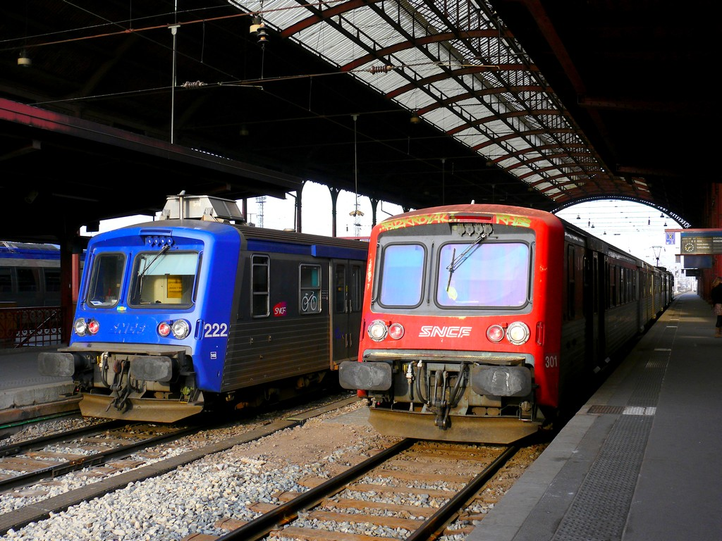 RRR Alsace en ancienne livrée et en livrée actuelle en gare de Strasbourg